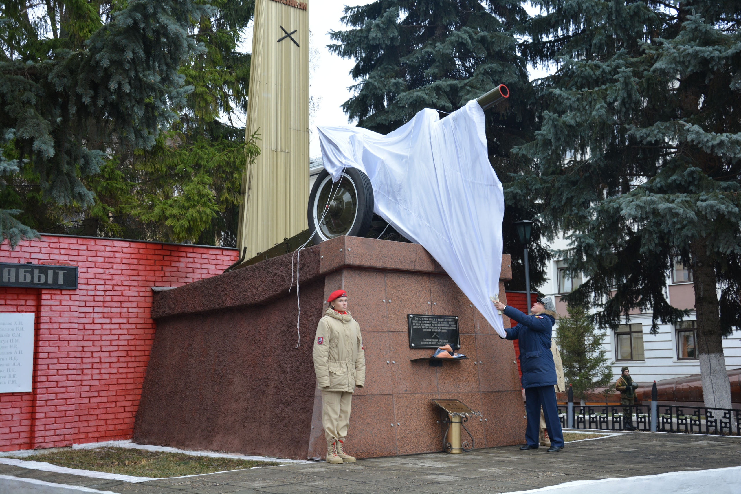 Возвращение М-30 на памятник воинам артиллеристам